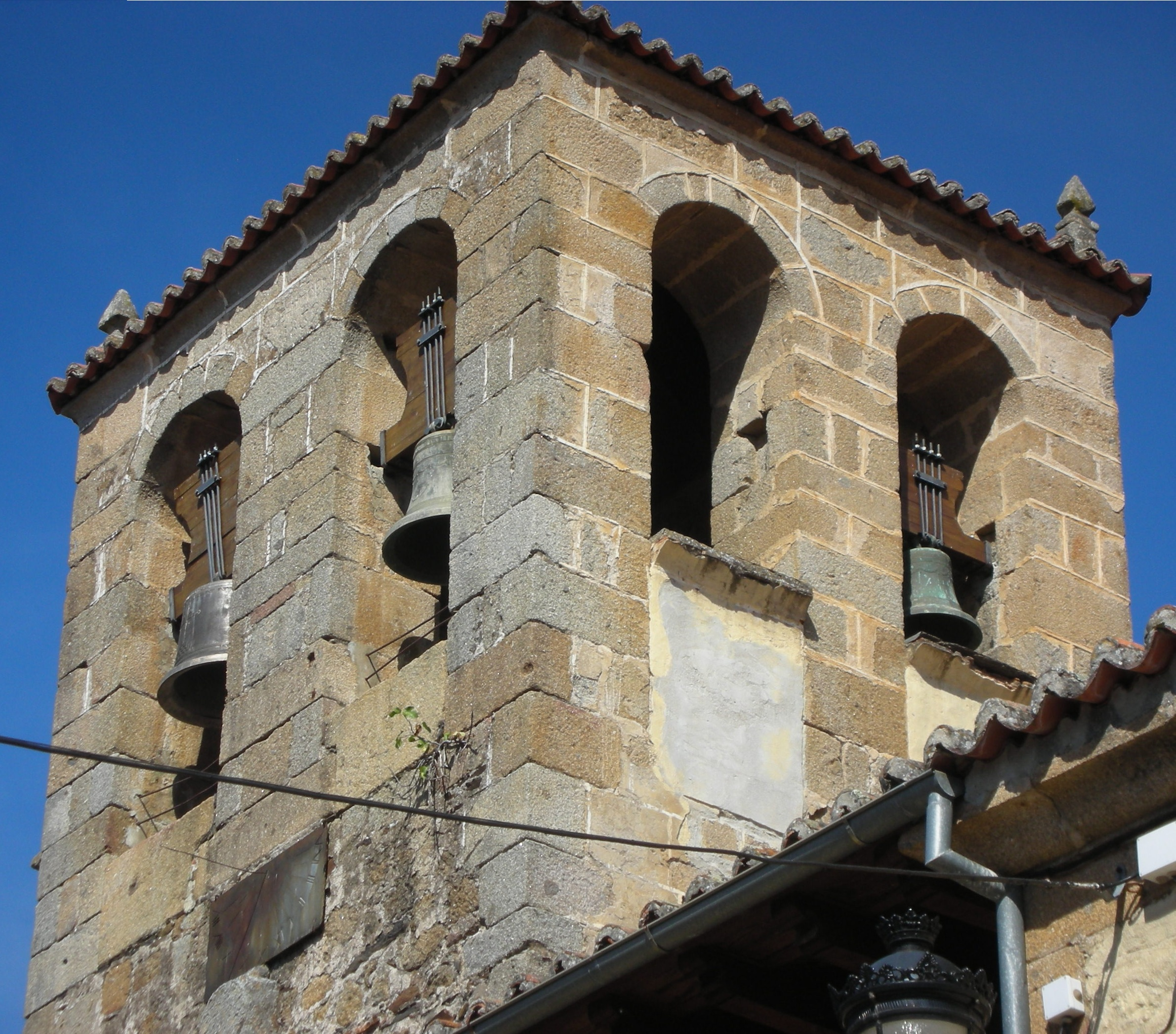 Détail cloche Eglise Nuestra Señora de la Asunción de la Commune de Sotoserrano en Espagne